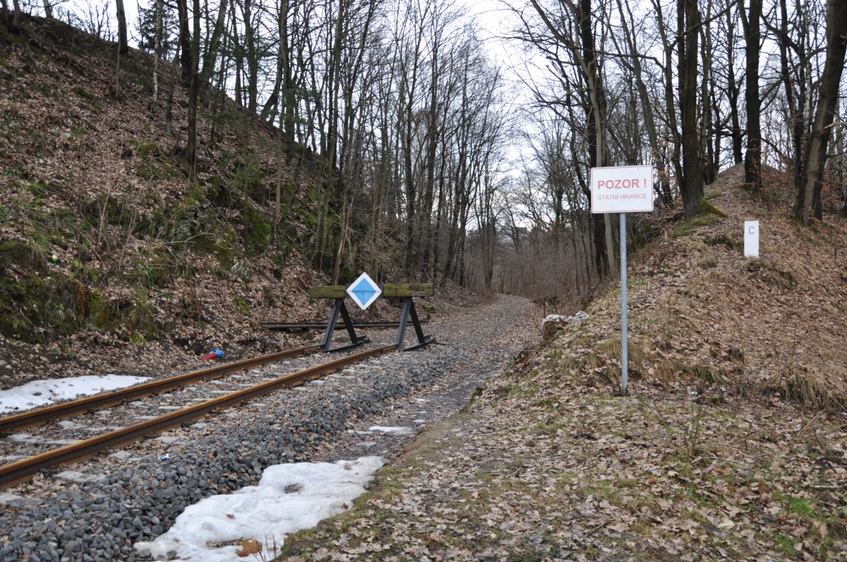 Bahnhof Dolní Poustevna, Tschechien, Gleisende an der Staatsgrenze zu Deutschland